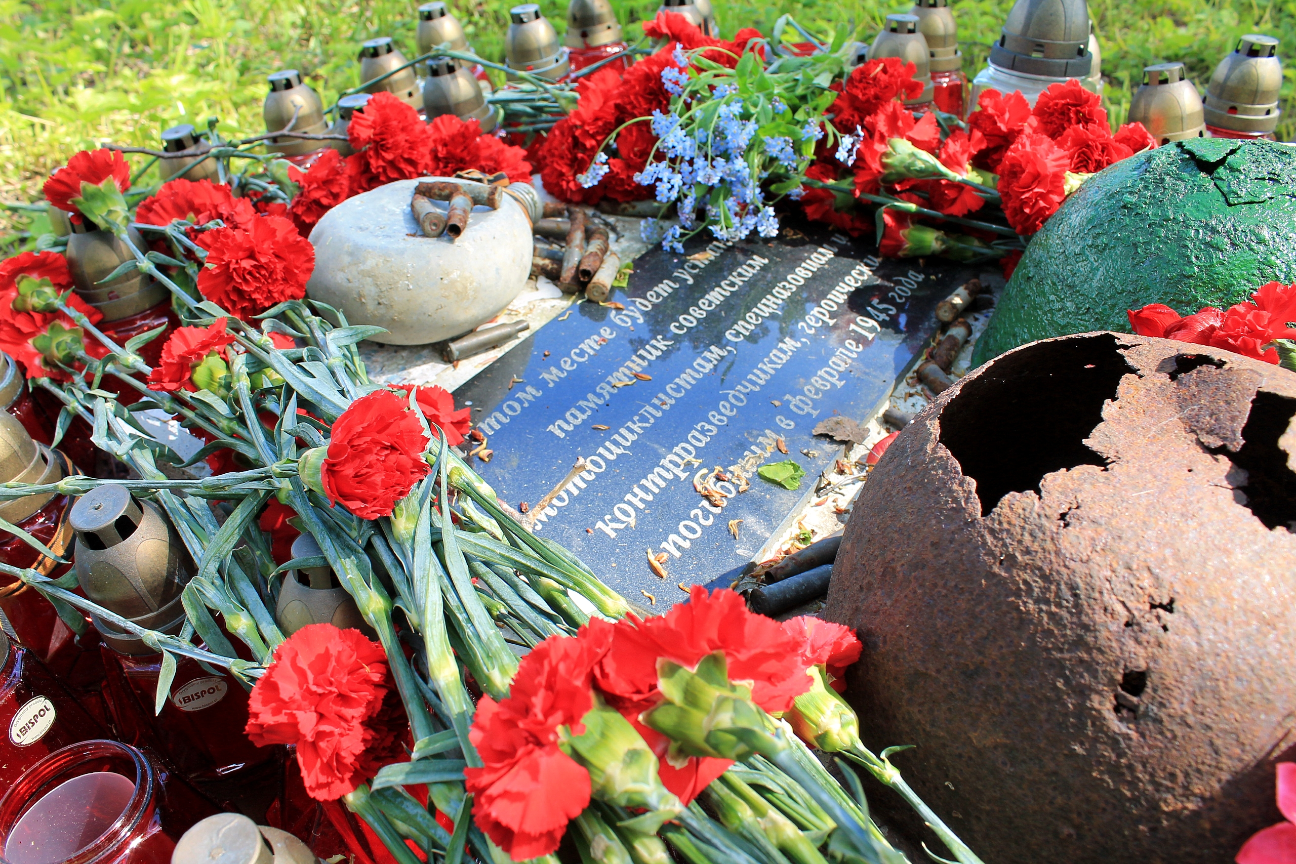 установлена на месте будущего мемориала погибшим в феврале 1945 года воинам-мотоциклистам